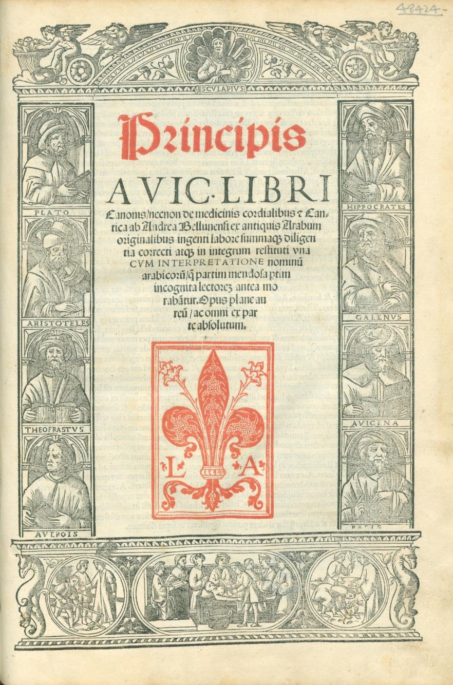 Avicenna, Canon (Venice, 1527) title page